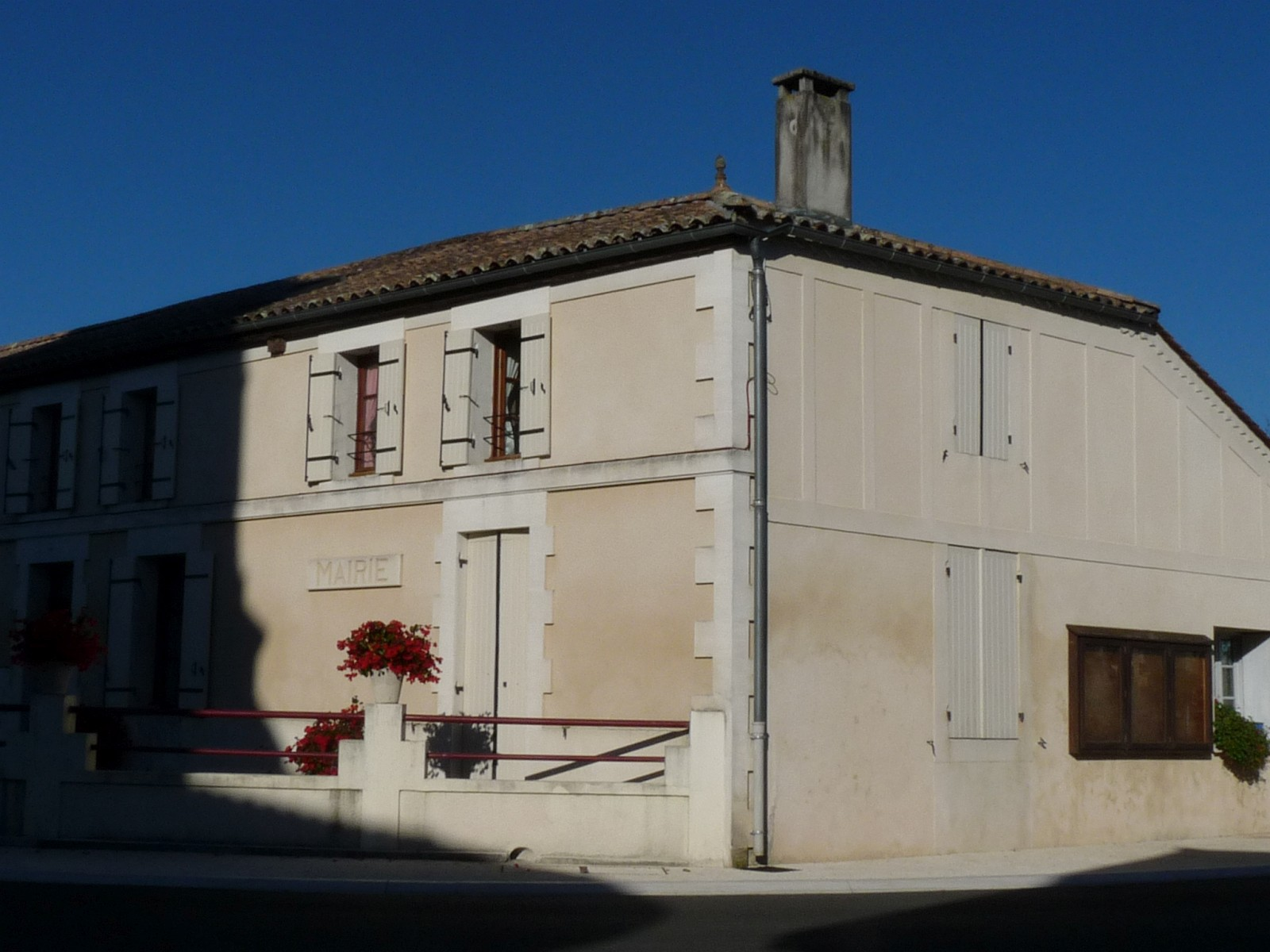 Mairie de Saint-Martin-de-Coux, Charente-Maritime, France